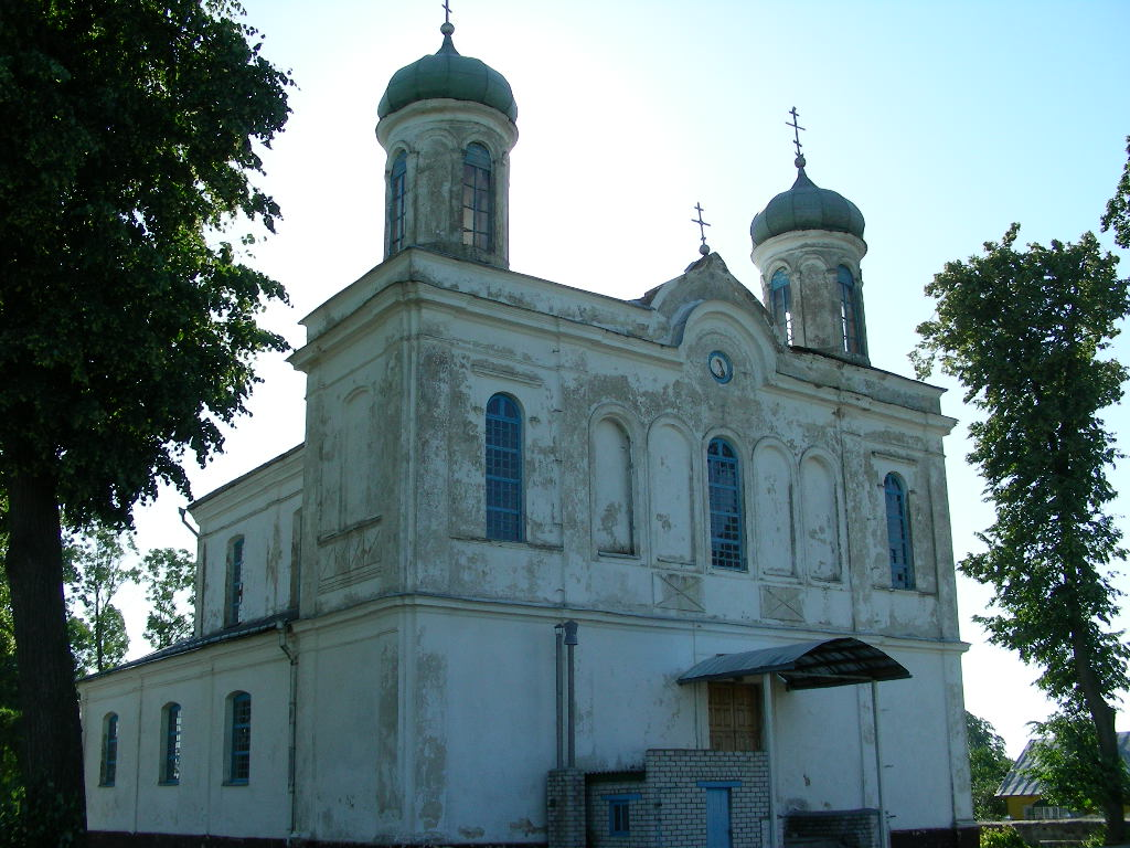 Беларуская (тарашкевіца): Царква Яна Прадцечы. в. Вішнявец This is a photo of Belarusian heritage monument. Reference number: 612Г000609 ( WLM)